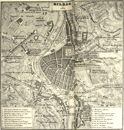 Bilboko planoa, 1857.